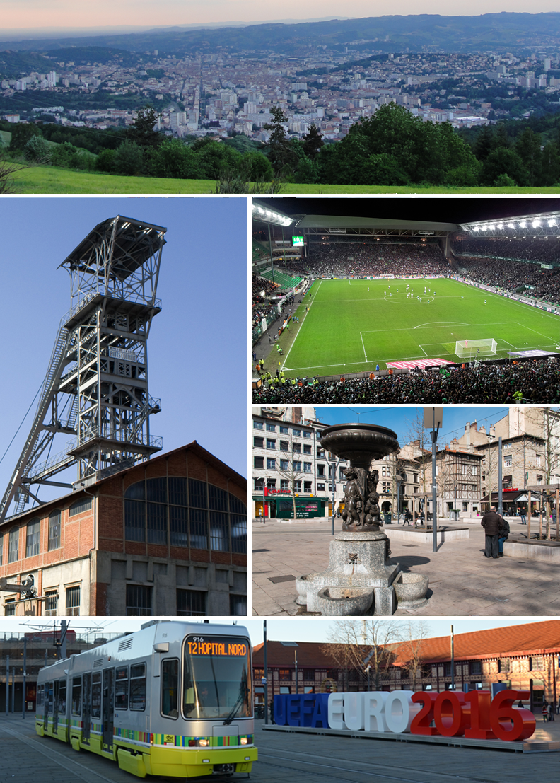 Différentes vues de Saint-Etienne